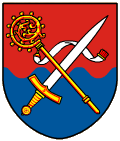 Znak obce Bystrovany